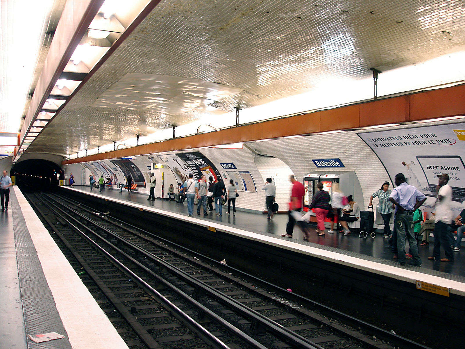 La station Belleville de la ligne 2 du métro de Paris, France